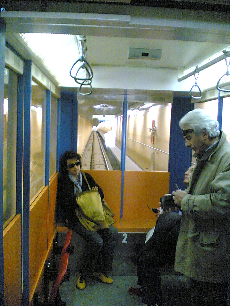 Ascensore Castello d'Albertis-Montegalletto di Genova, cabina nel tratto orizzontale.